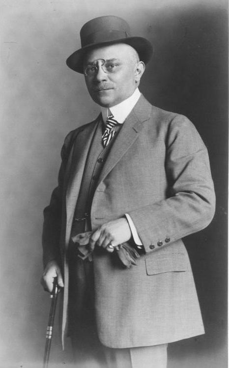 Porträt von Heinrich Lefler um 1900. Fotografie von Wenzl Weis.